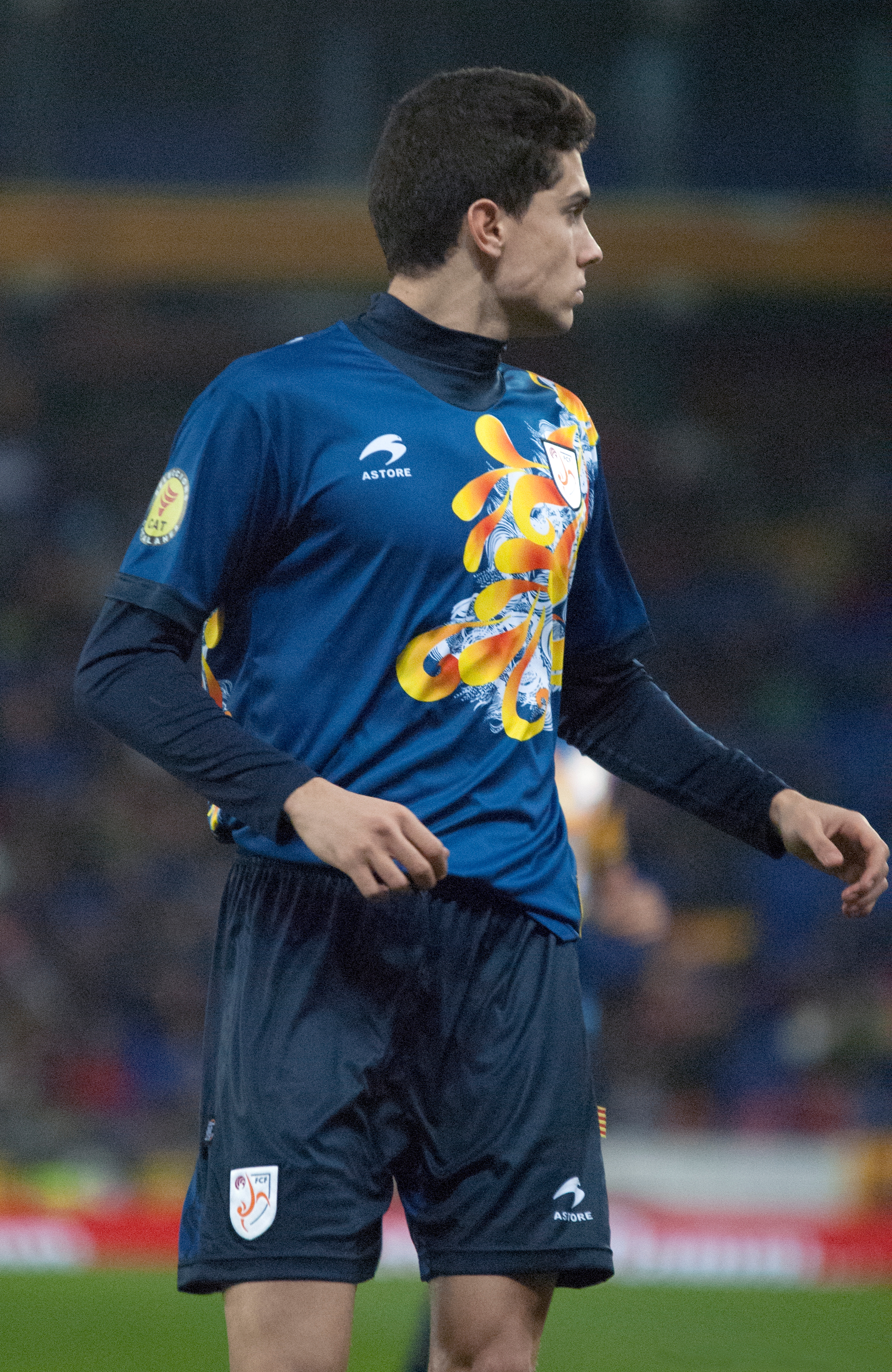 Marc Bartra amb la samarreta de Catalunya, 2 de gener de 2013.